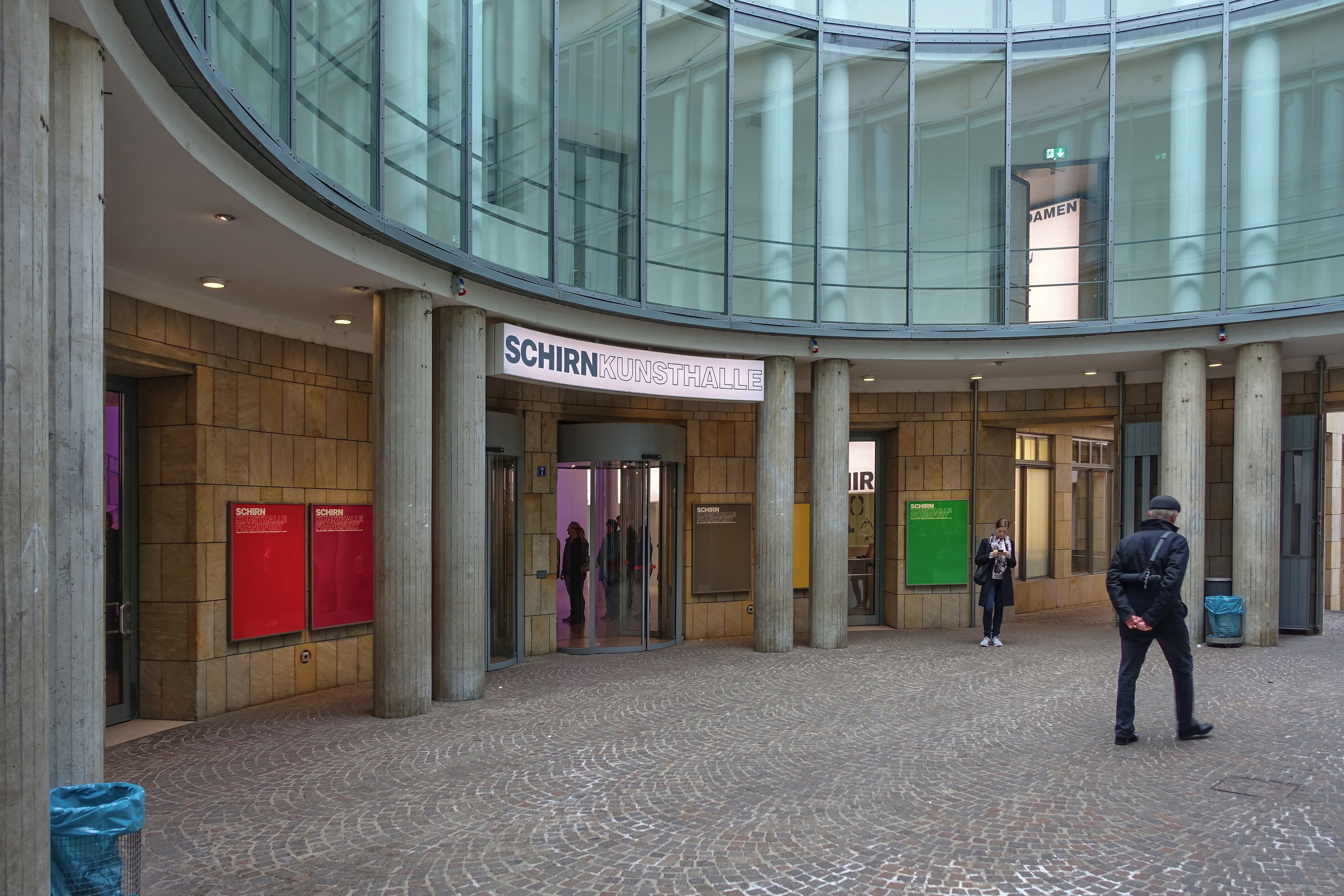 Schirn Kunsthalle Eingang